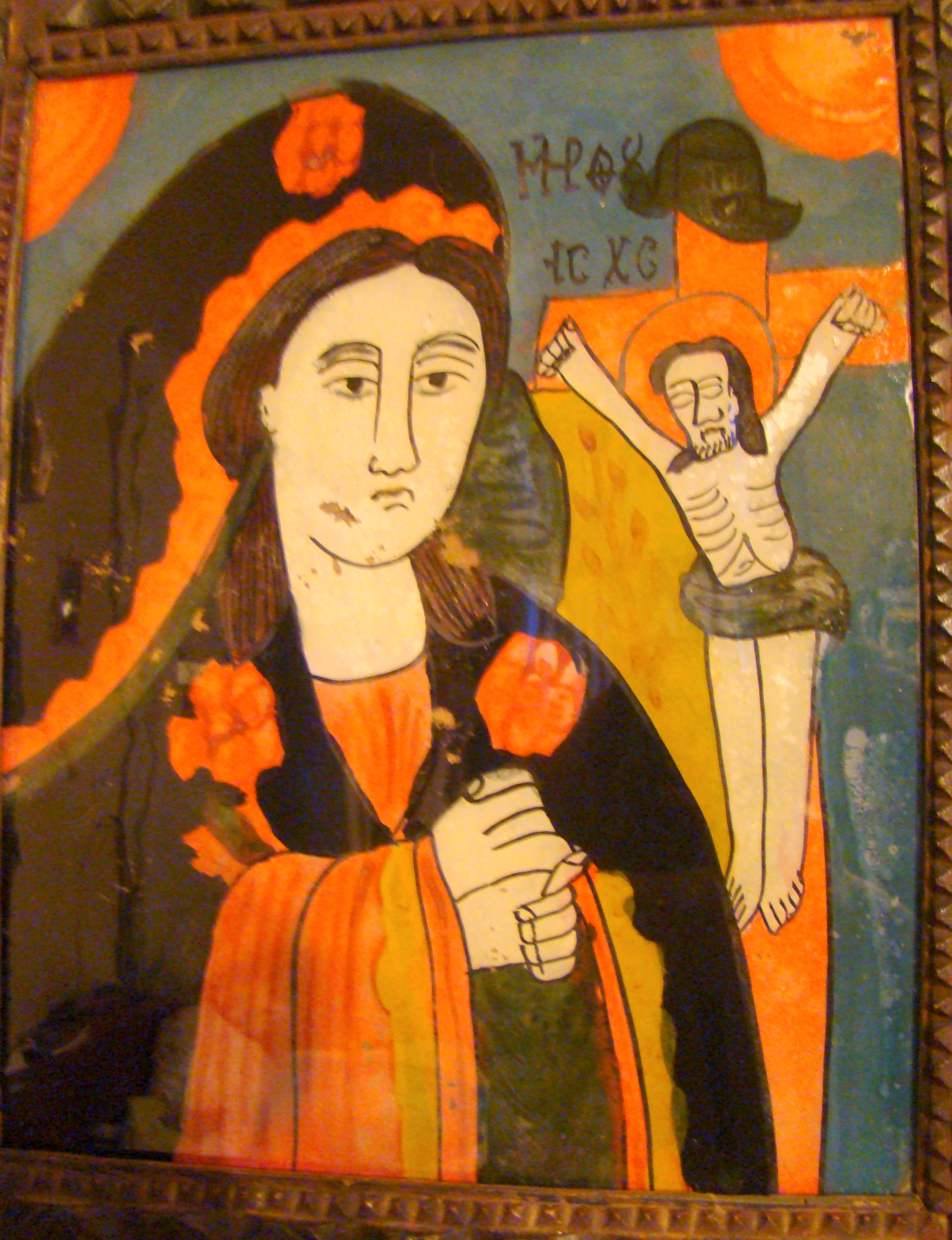 Icoana Maicii Domnului jalnică (Şcoala de la Nicula, secolul XIX)